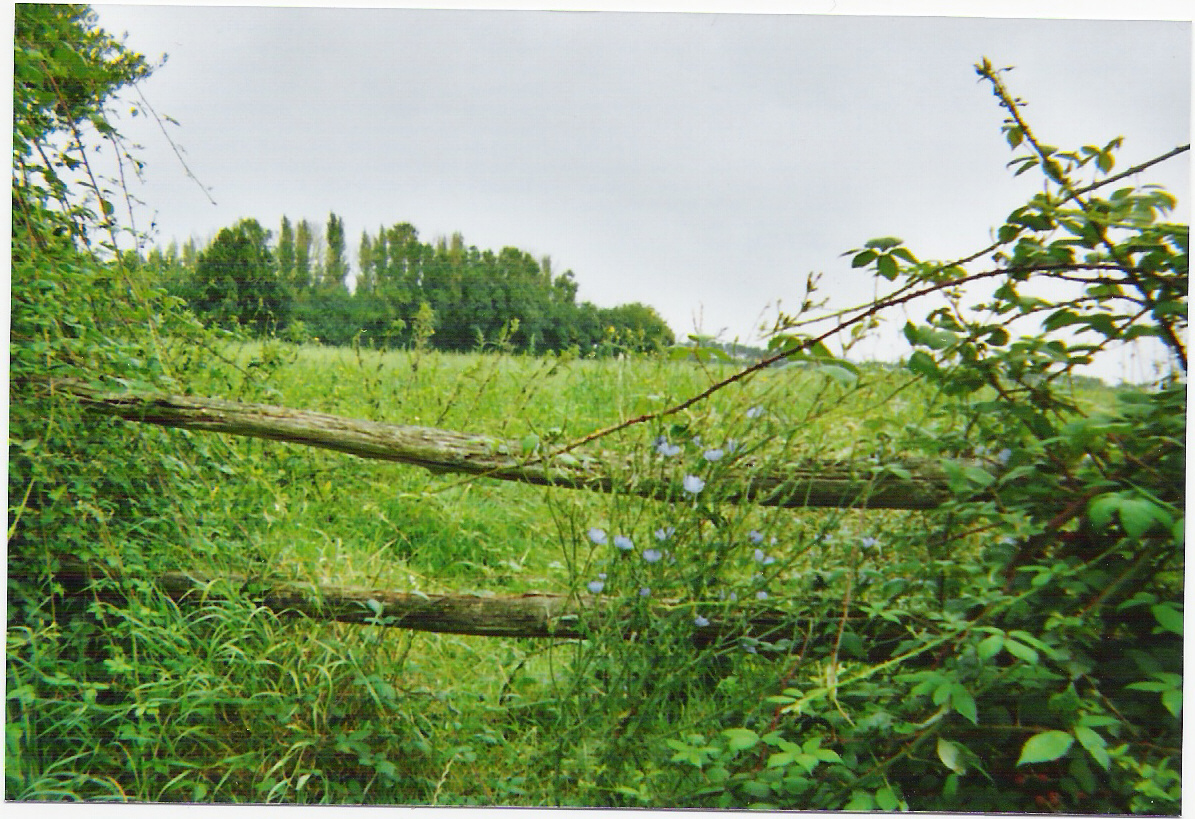 Barrière du marais bénédictin à Saint-Benoist-sur-Mer.